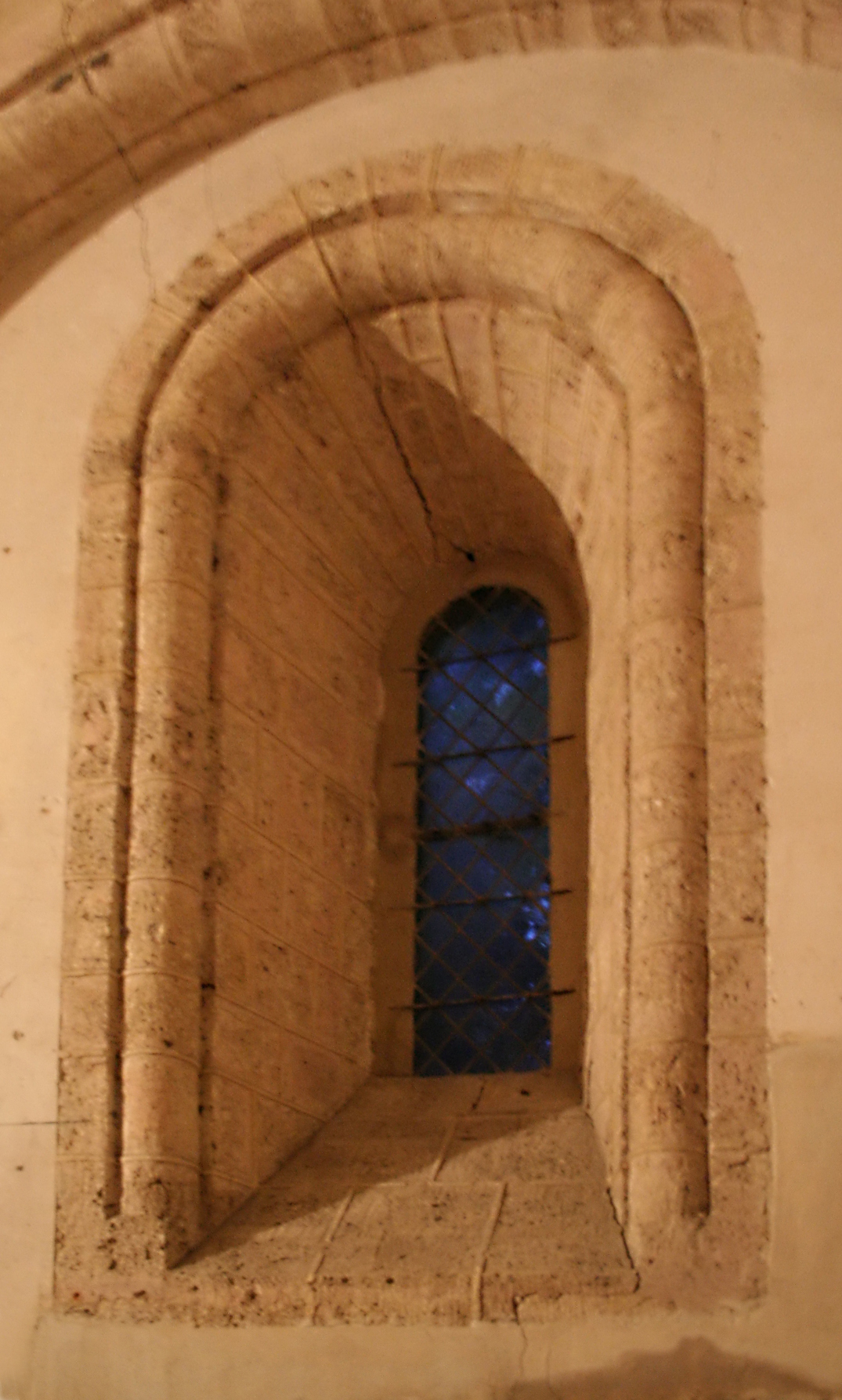 Église Saint-André-d'Hébertot, fenêtre du chœur. .